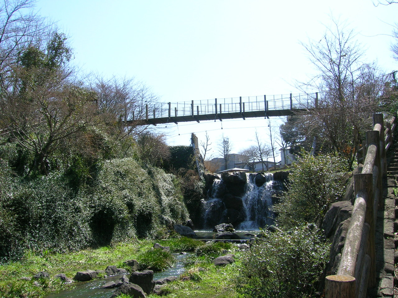 Shirasawa gawa. (Shirasawa river in Shirotsuchi park) Loc: Moriyama-ku, Nagoya city, Aichi Prefecture, Japan 白沢川（城土公園） 撮影場所 愛知県名古屋市守山区